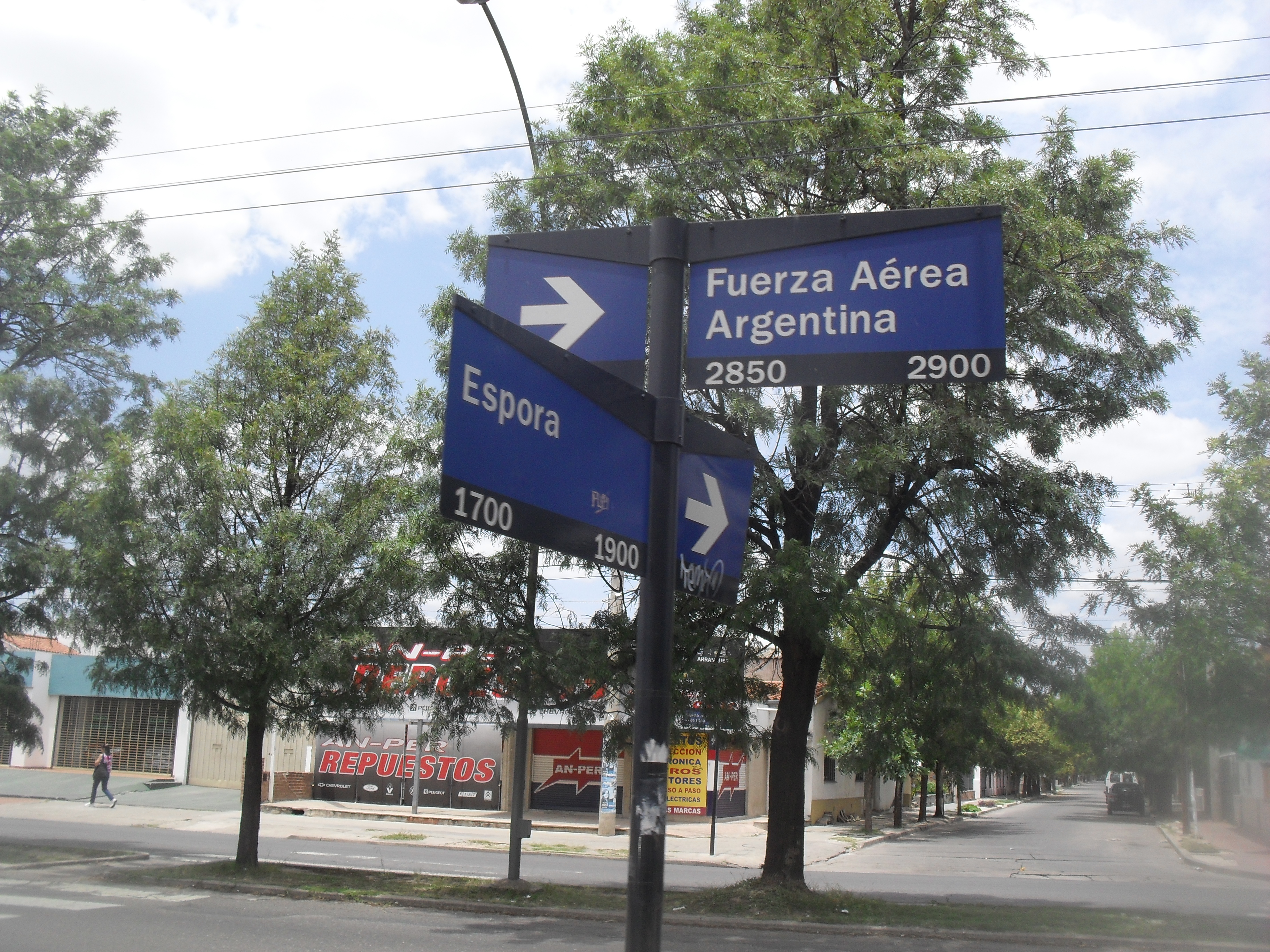 Carteles nomenclador de Córdoba.